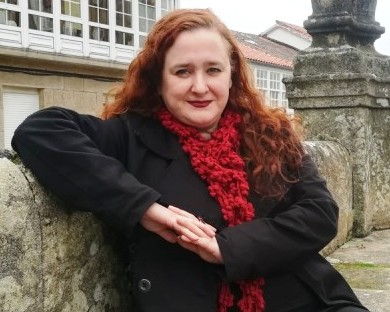 Inma António en 2018.